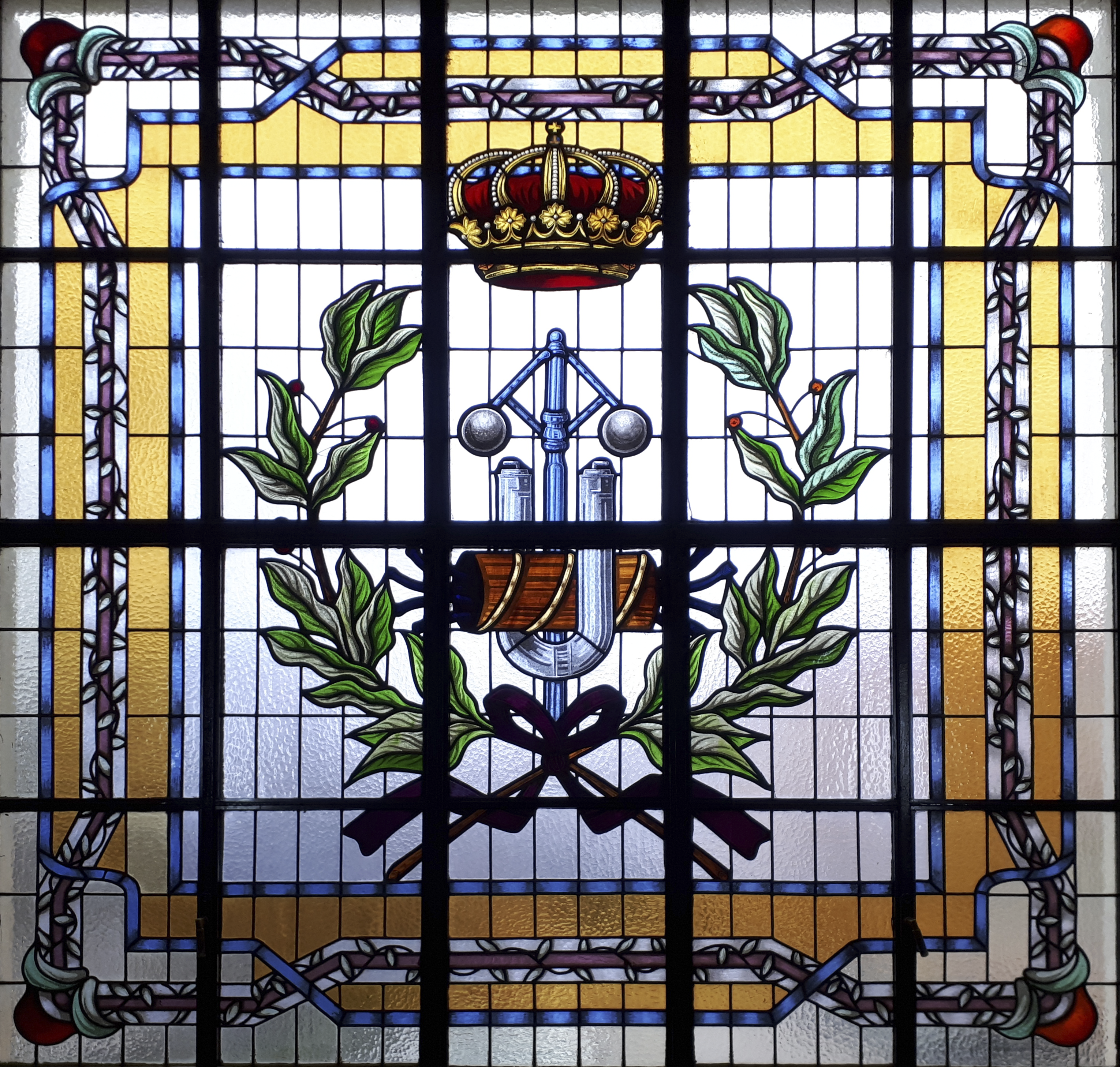 Escudo de la Escuela Técnica Superior de Ingenieros Industriales de la Universidad Politécnica de Madrid (España).